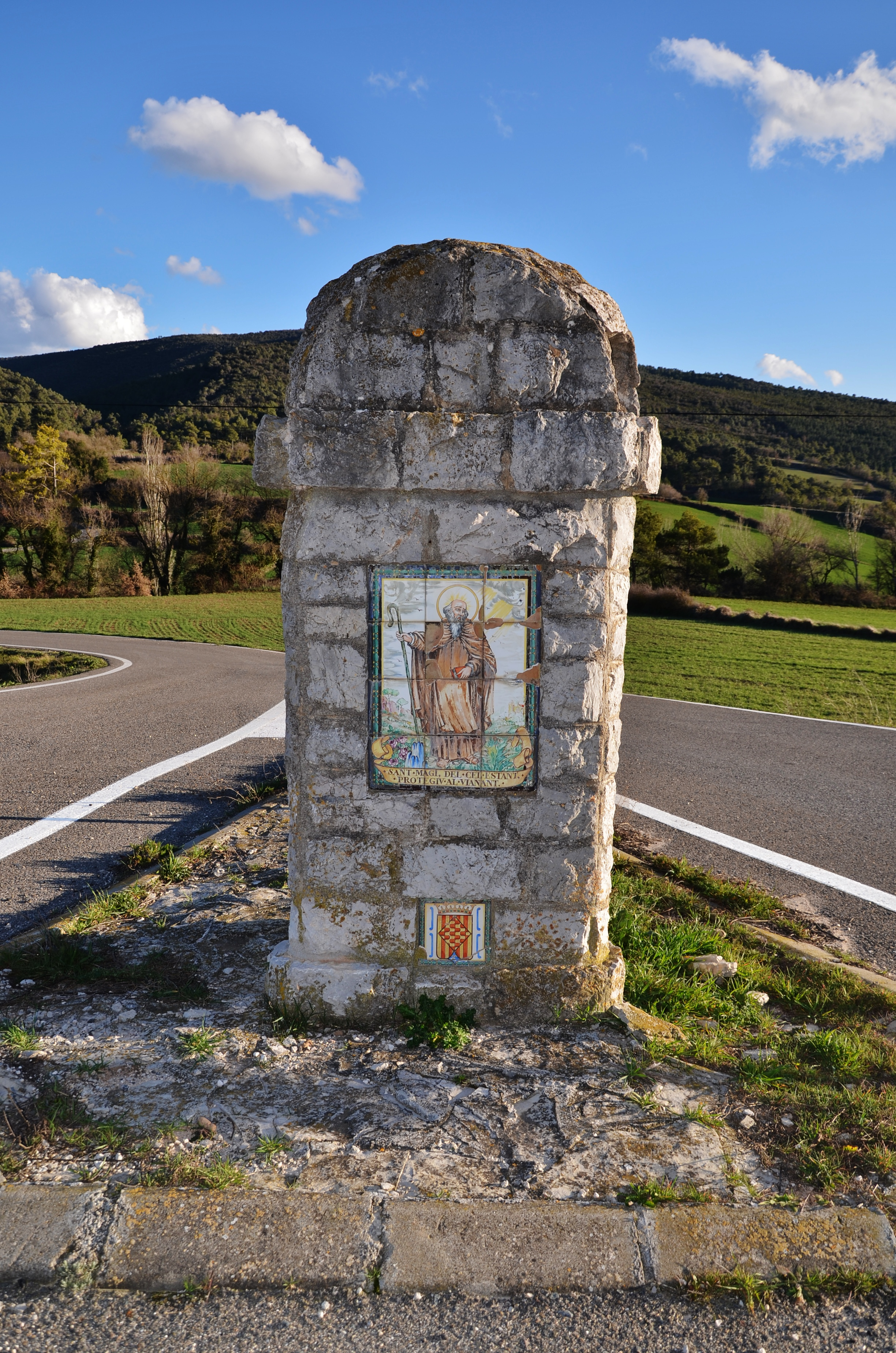 Santuari de Sant Magí de Brufaganya (Pontils)